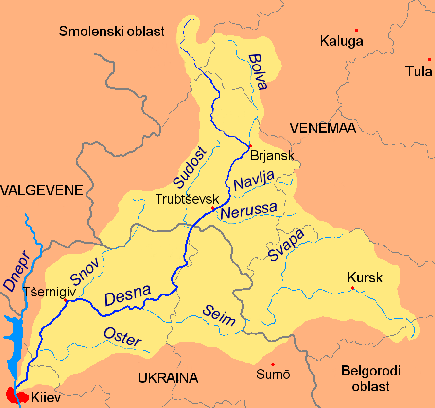 Desna jõgi